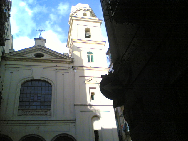 Campanile, Trinità degli Spagnoli, Napoli